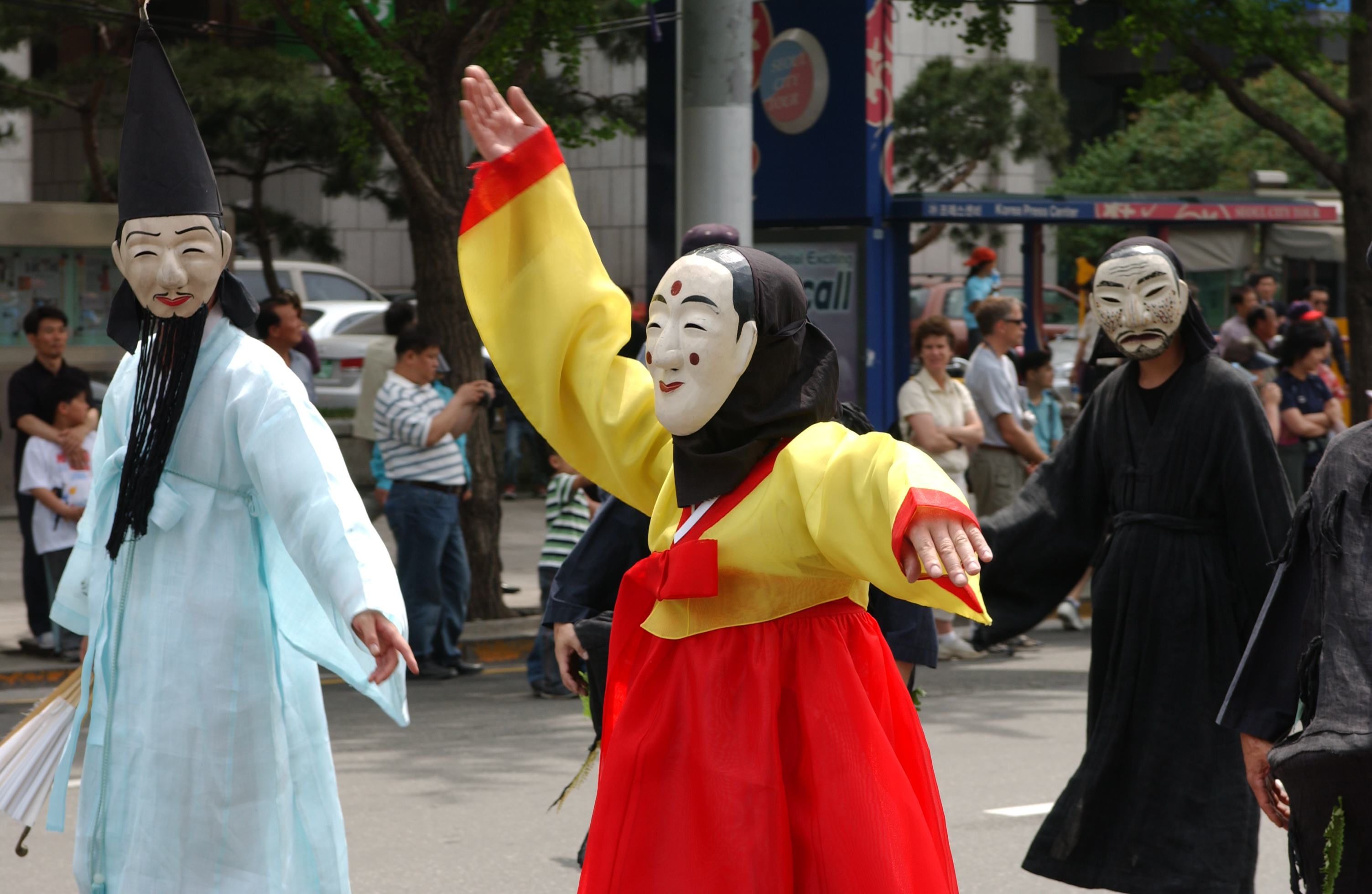 2005년 5월 서울특별시 종로구 하이서울페스티벌 퍼레이드